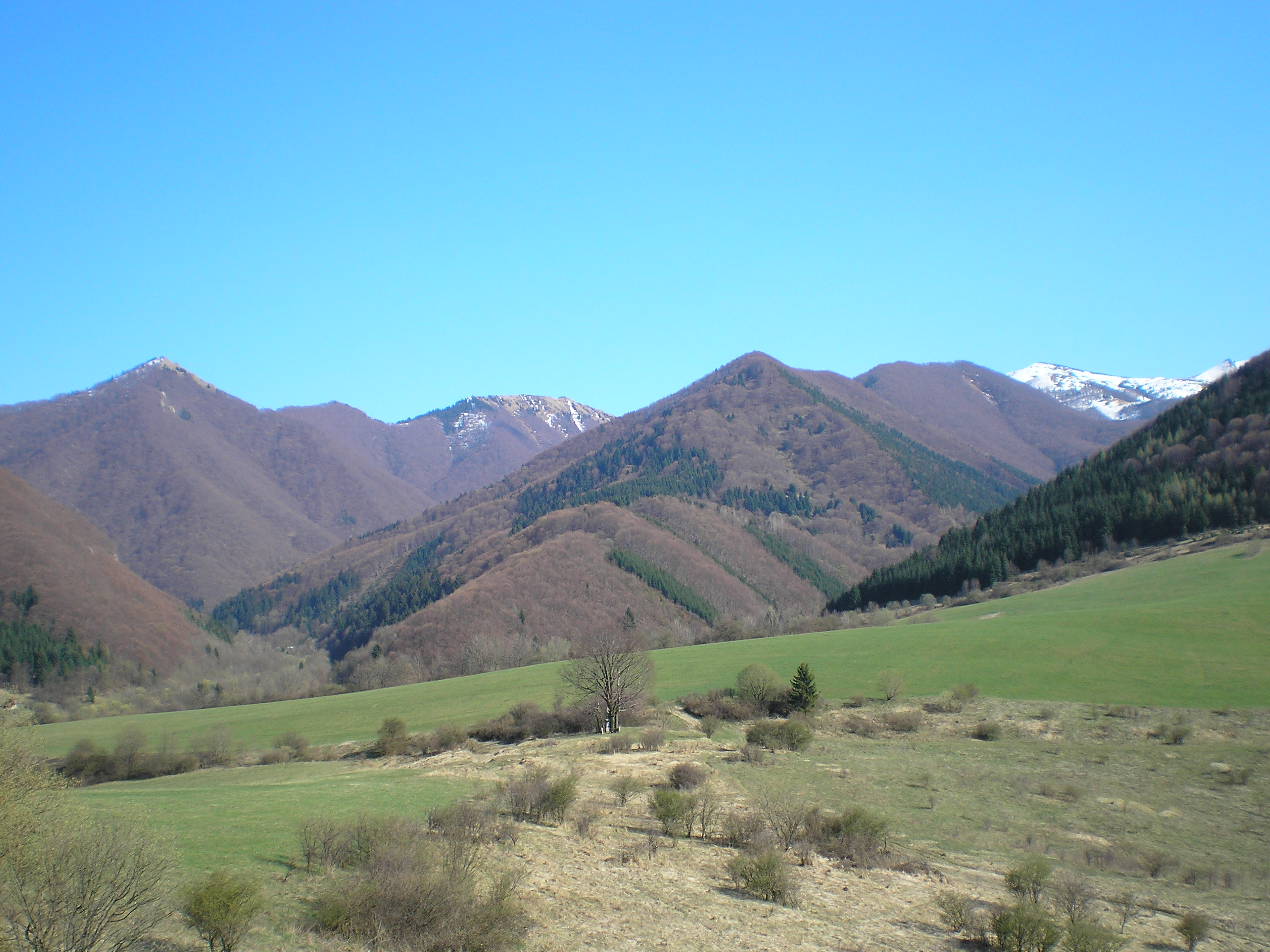 Veľká Bránica (in background) in Lesser Fatra, Slovakia